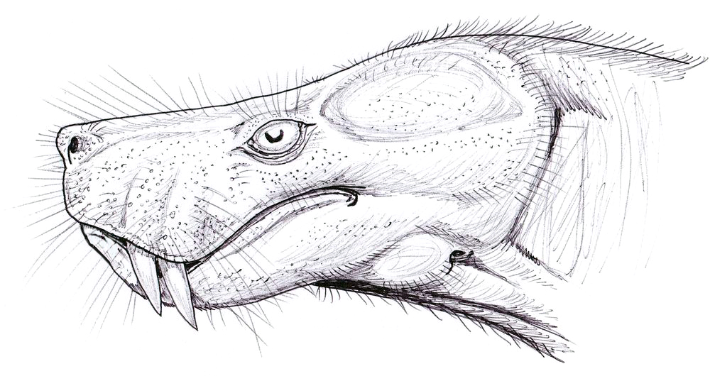 Lycosuchus